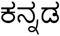 Каннада